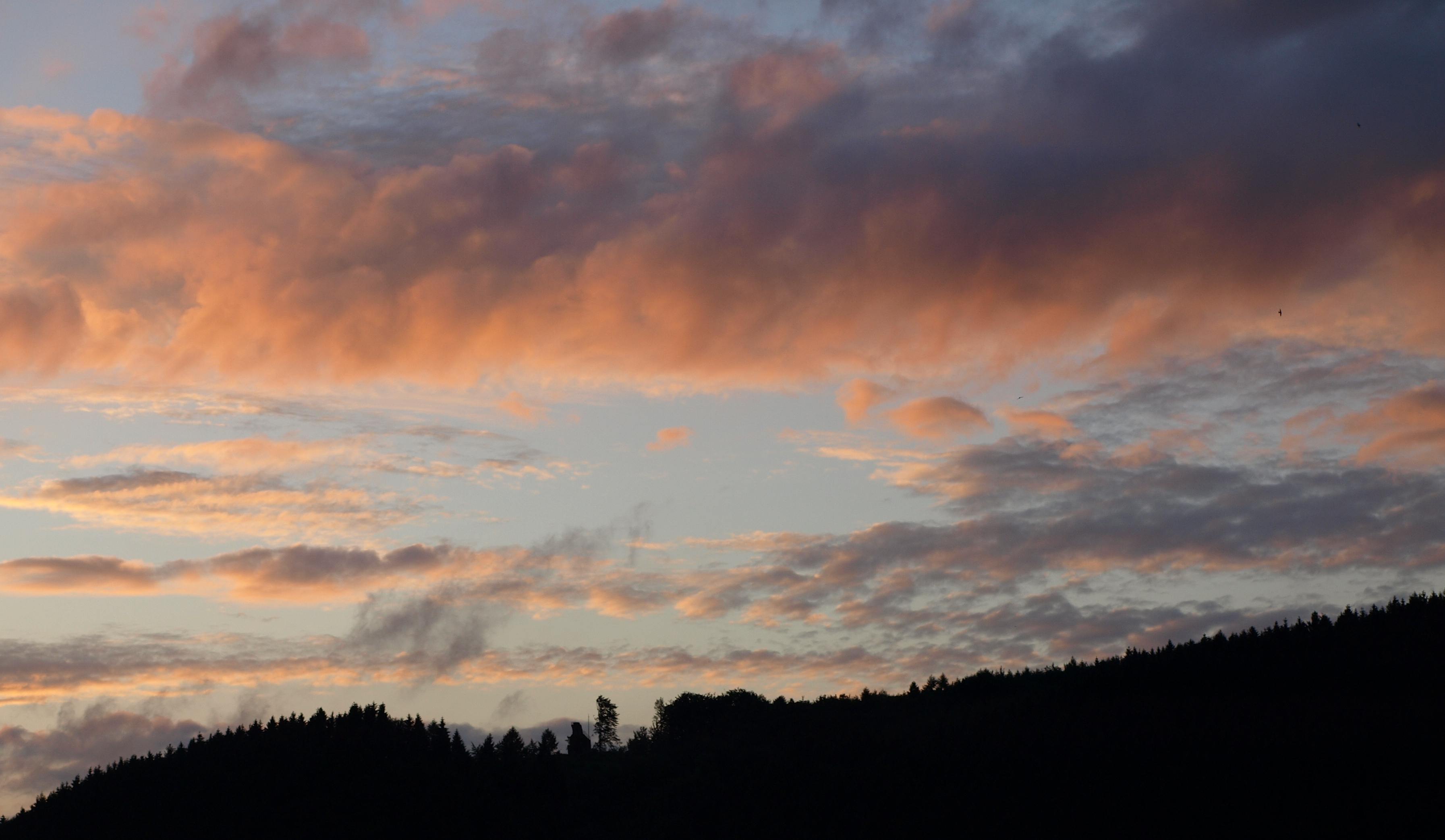 Blick auf den Meerhardtsturm in Gummersbach-Dieringhausen am Abend